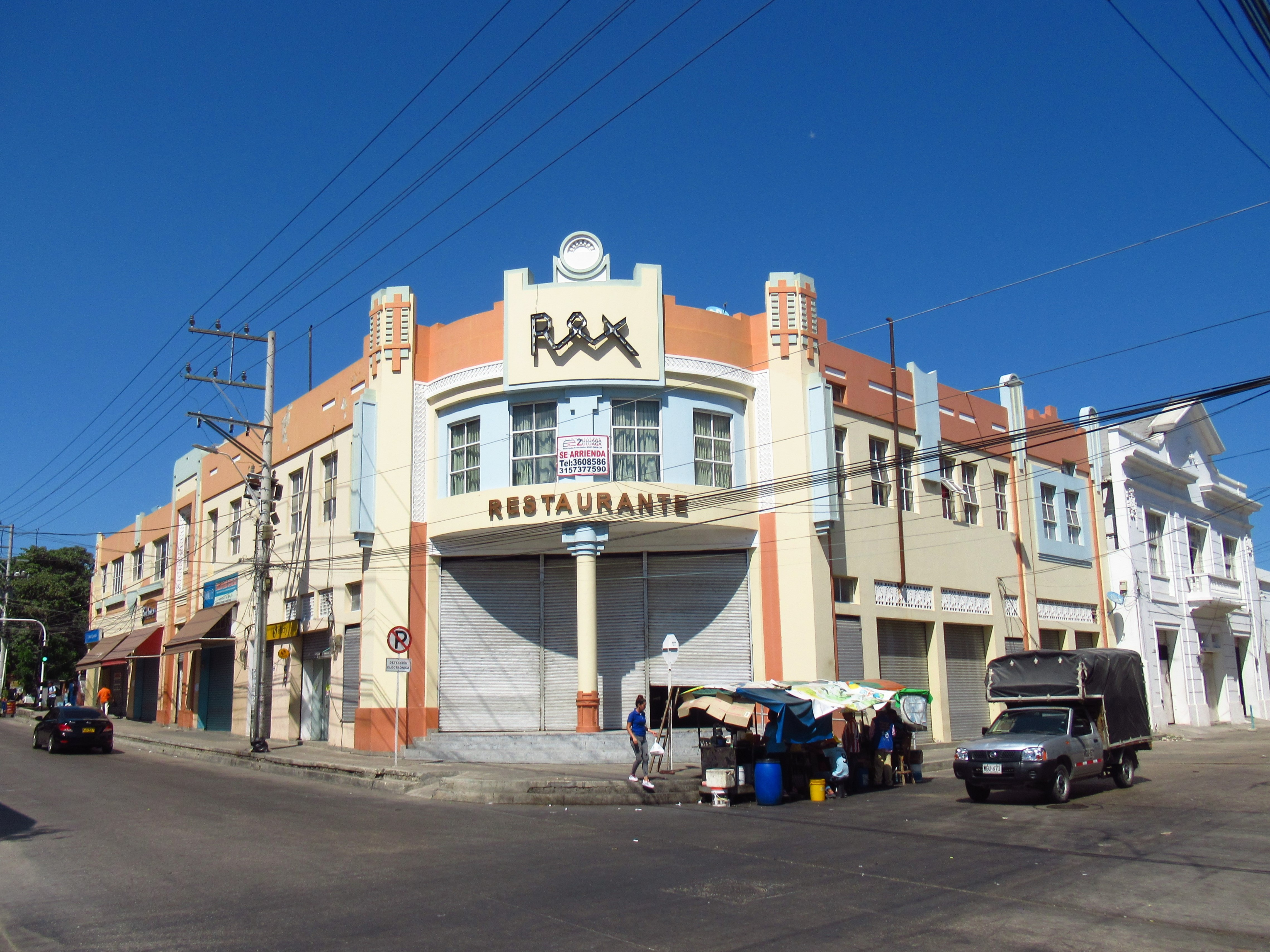 Teatro Rex de Barranquilla.